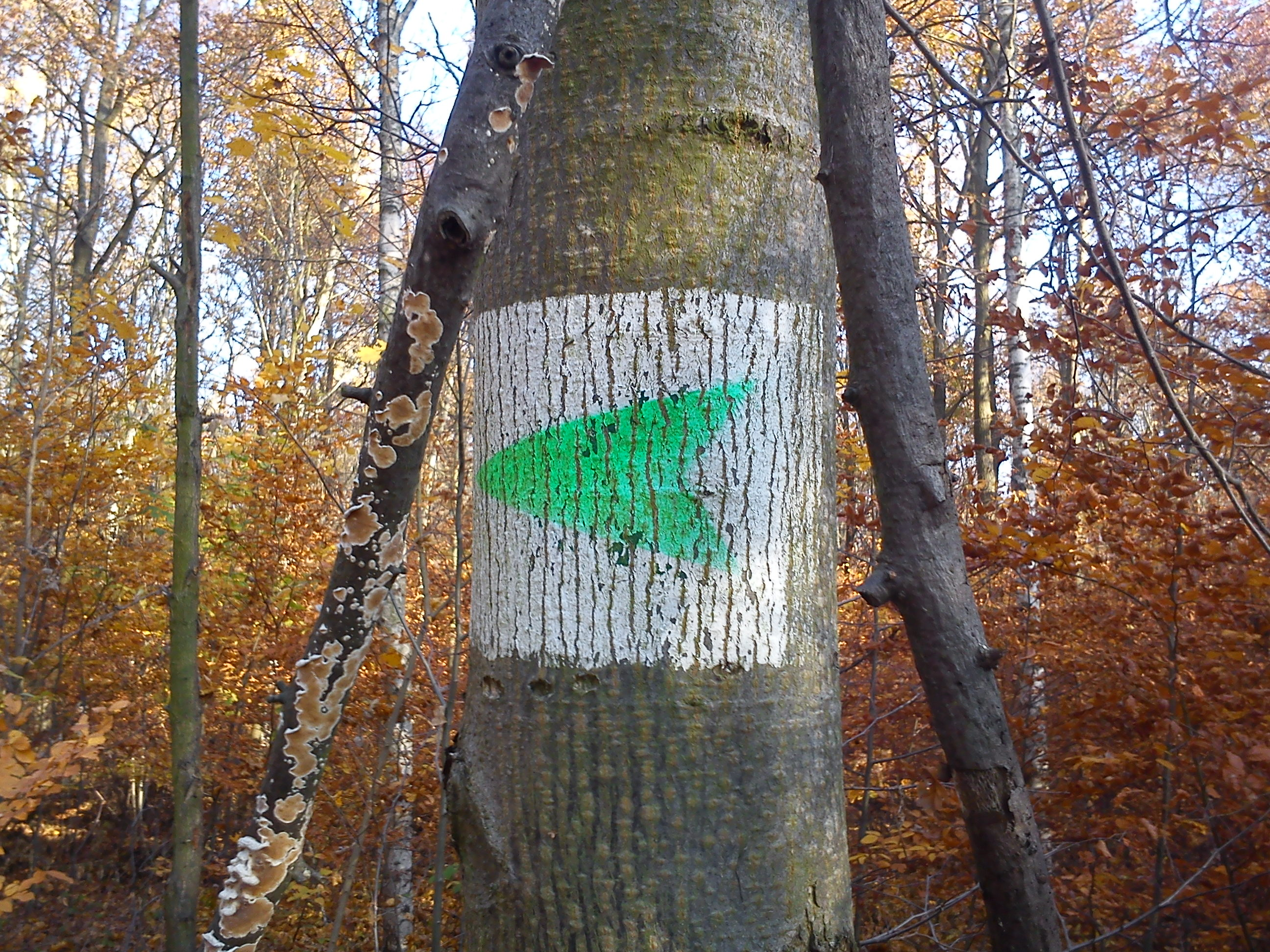 Educational path. Poznań, Lasek Marceliński.